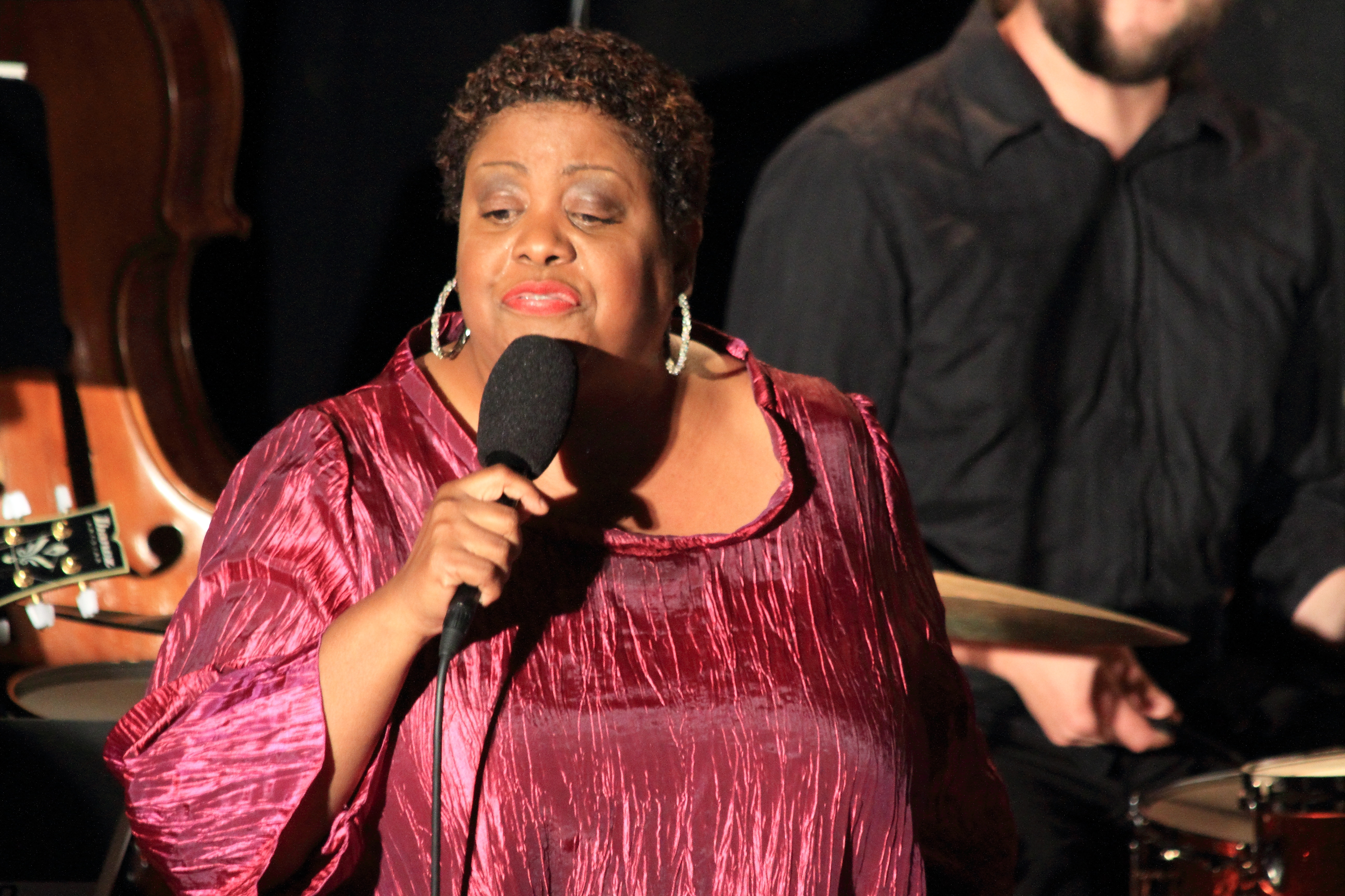 Carmen Bradford & Jazz Orchester Steiermark unter der Leitung von Sigi Feigl mit dem Programm Love for Ella auf dem INNtöne Jazzfestival 2017.